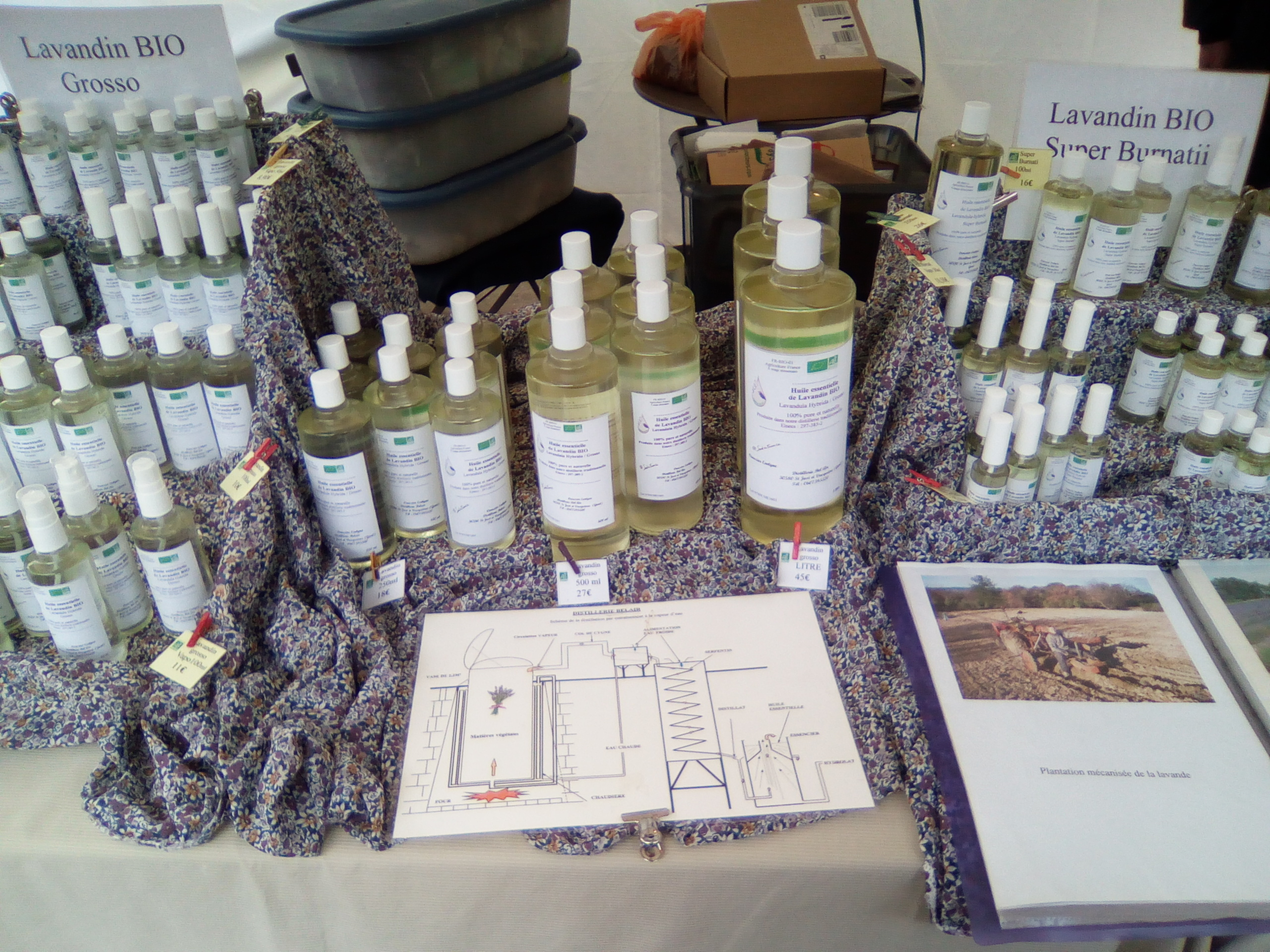 Stand du marché des Producteurs de Pays boulevard de Reuilly